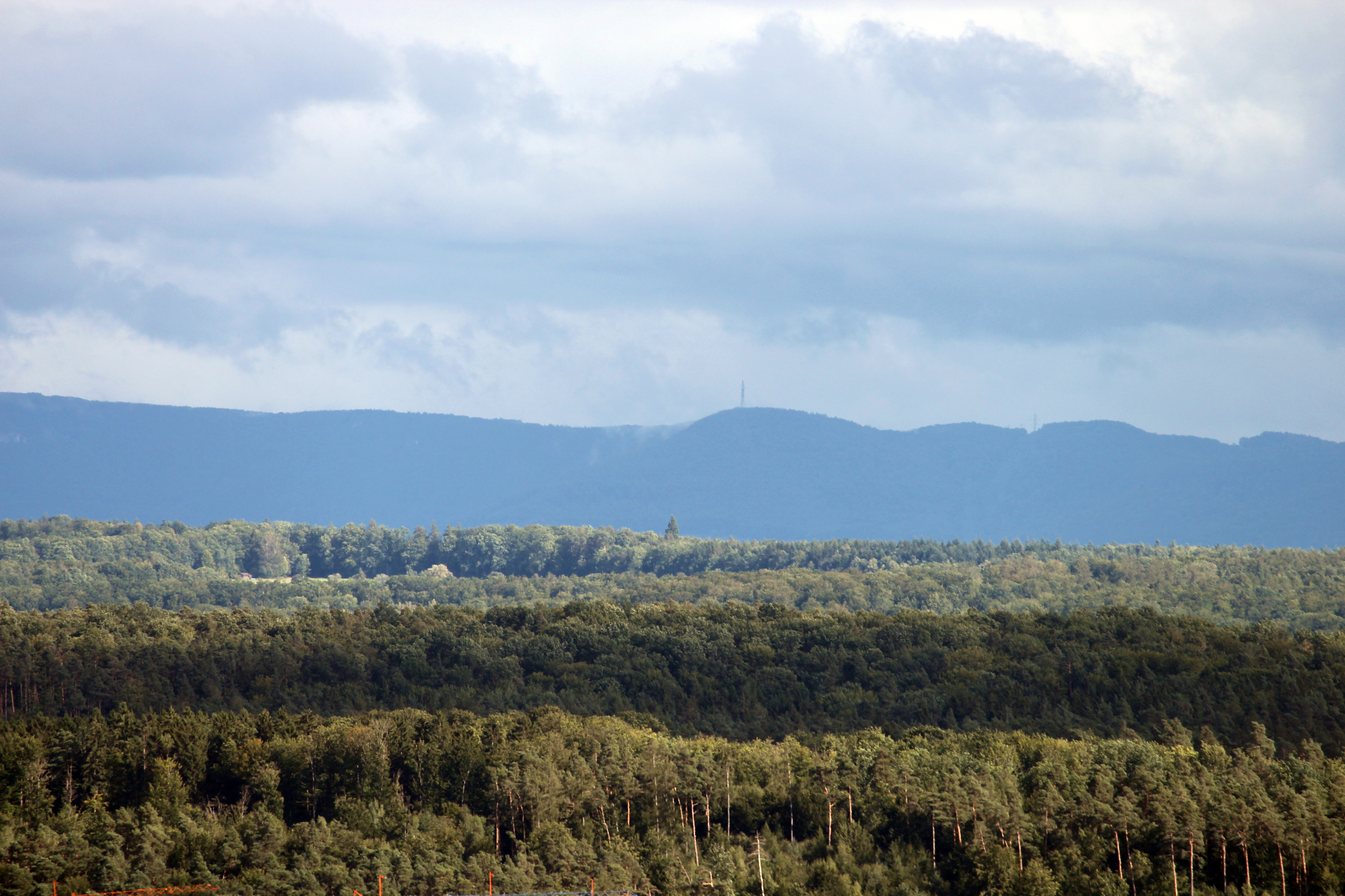 Im Bildzentrum überragt der Mammutbau deutlich. Aus Blickrichtung Schönaich, Aussichtsplatte vom First. Im Hintergrund der Albtrauf, Bildmitte das Rossfeld bei Glems. Entfernung Fotoapparat/Baum rund 8 km.